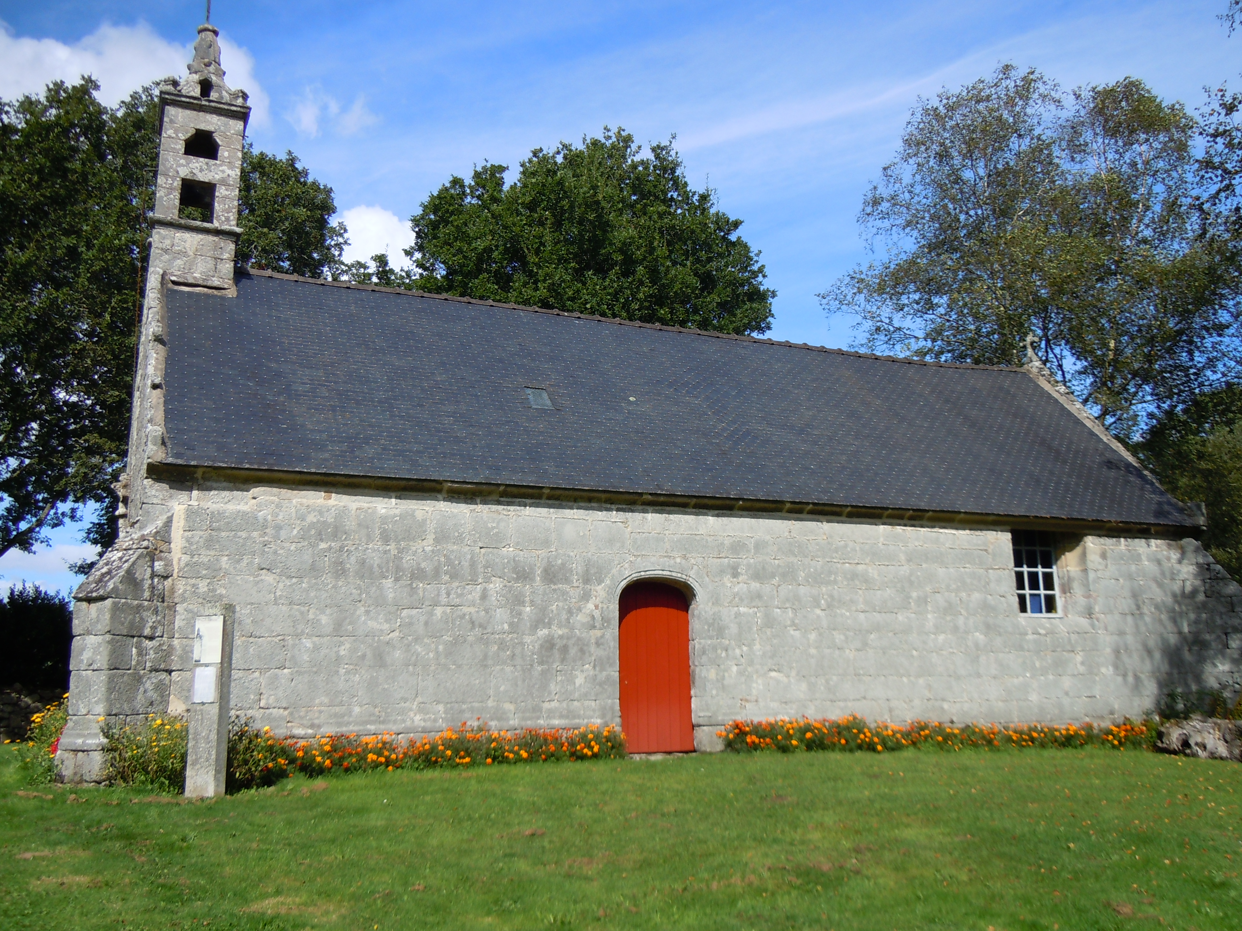 chapelle Saint-Brendan de Langonnet, fin XVIe siècle, département du Morbihan, France